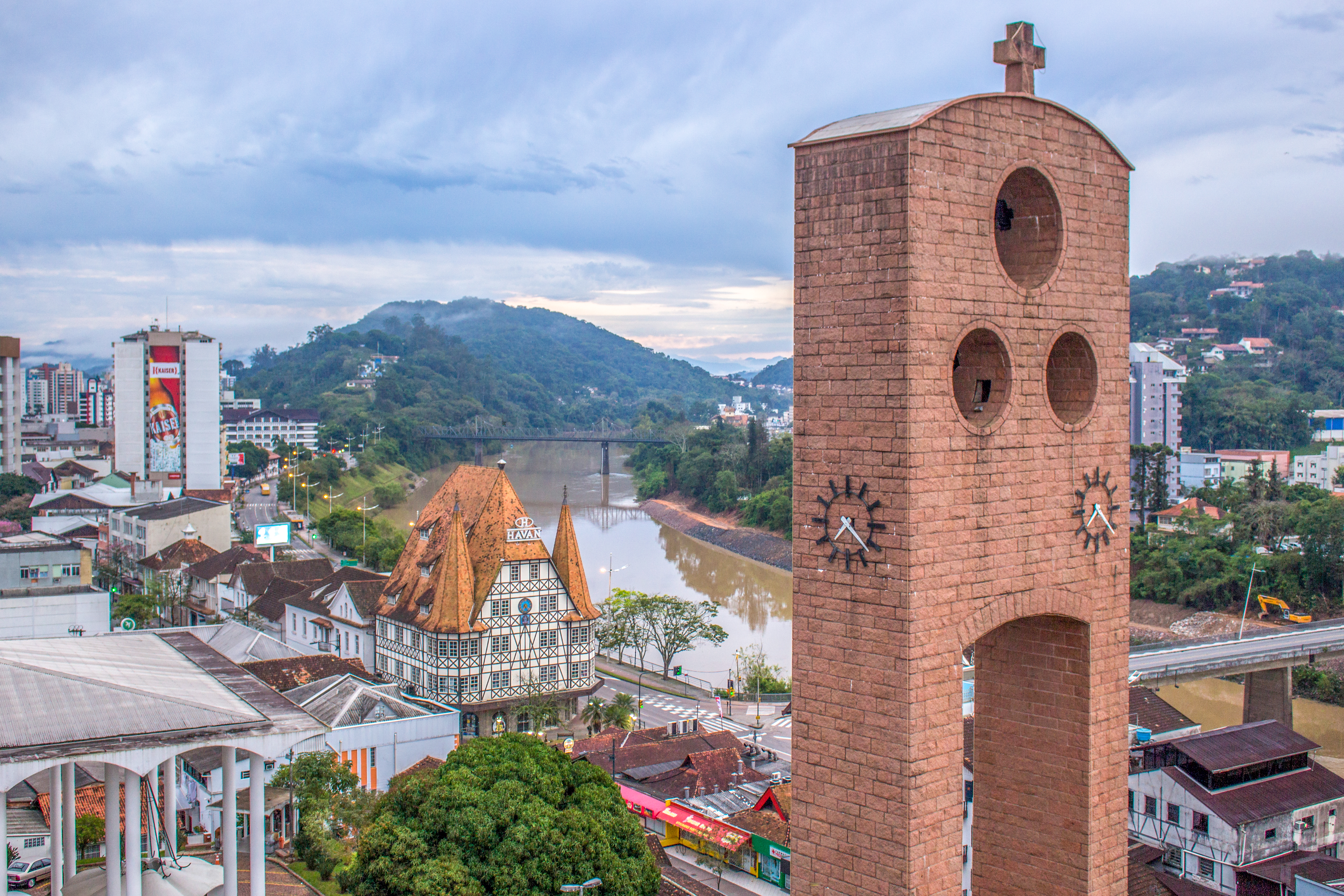 Vista panorâmica de Blumenau